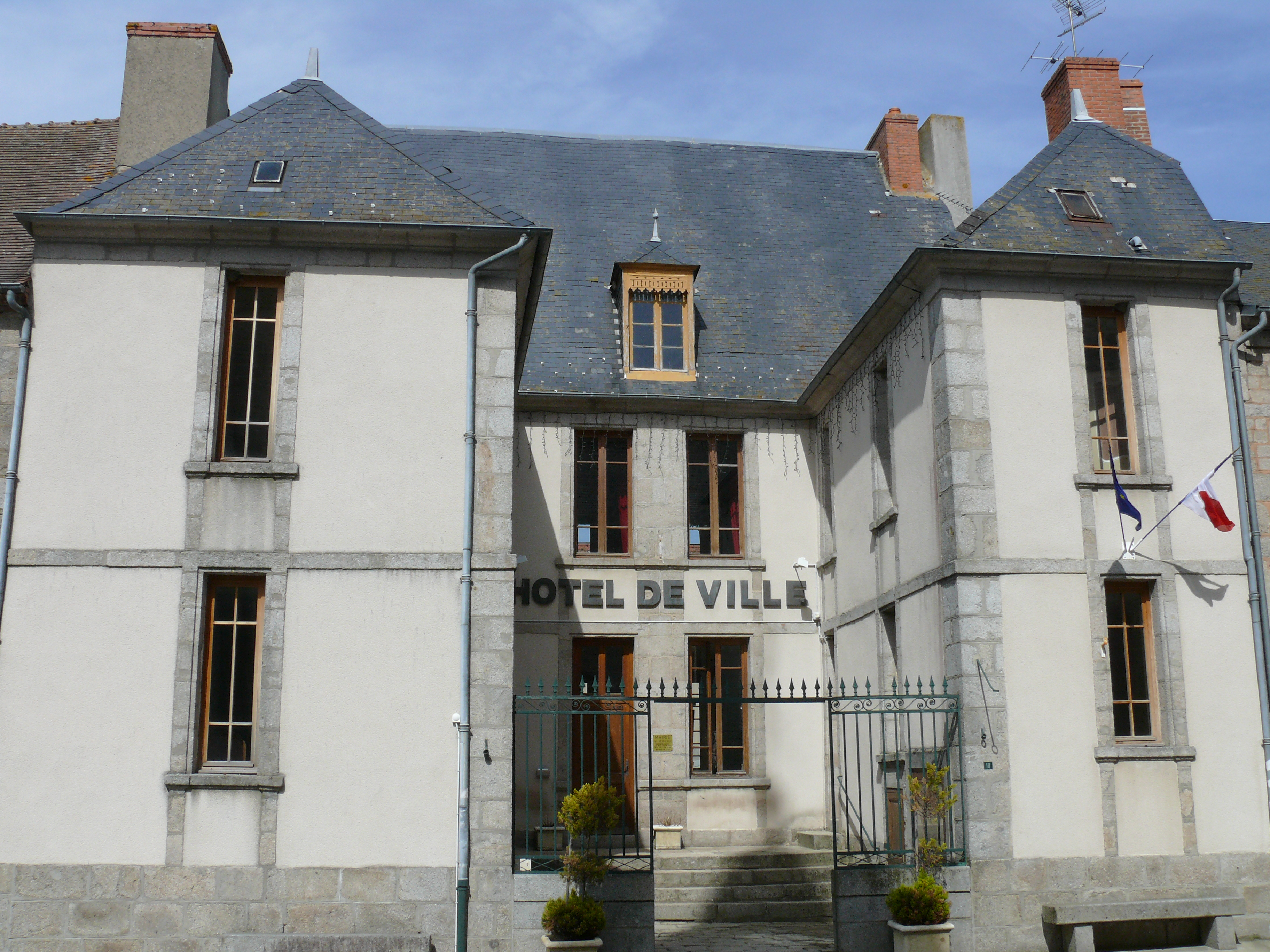 Chénérailles - Hôtel de ville, près de l'église